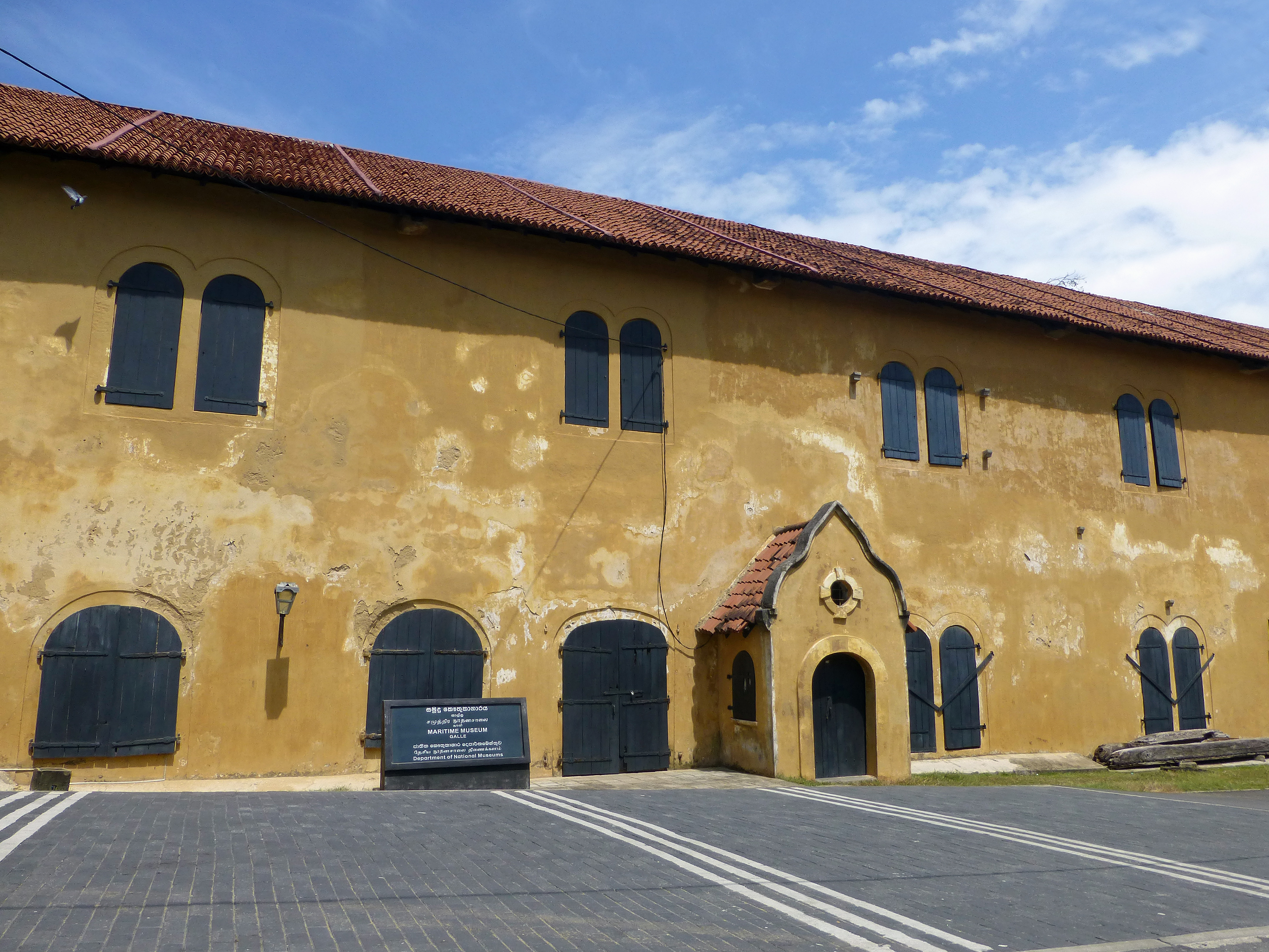 Galle (Sri Lanka) : Maritime Archaeology Museum